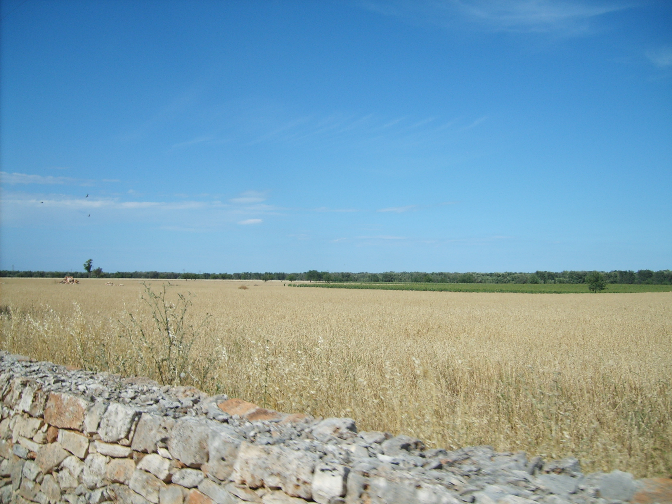 Scorcio dell'agro francavillese